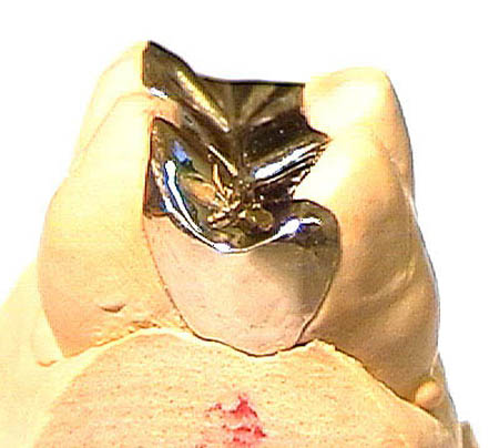 Inlay, Goldlegierung, inkagoldgelb